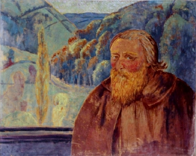 Paul Sérusier : Autoportrait à la barbe rutilante (tableau peint vers 1907-1908 et acquis par la ville de Châteauneuf-du-Faou en 2017)